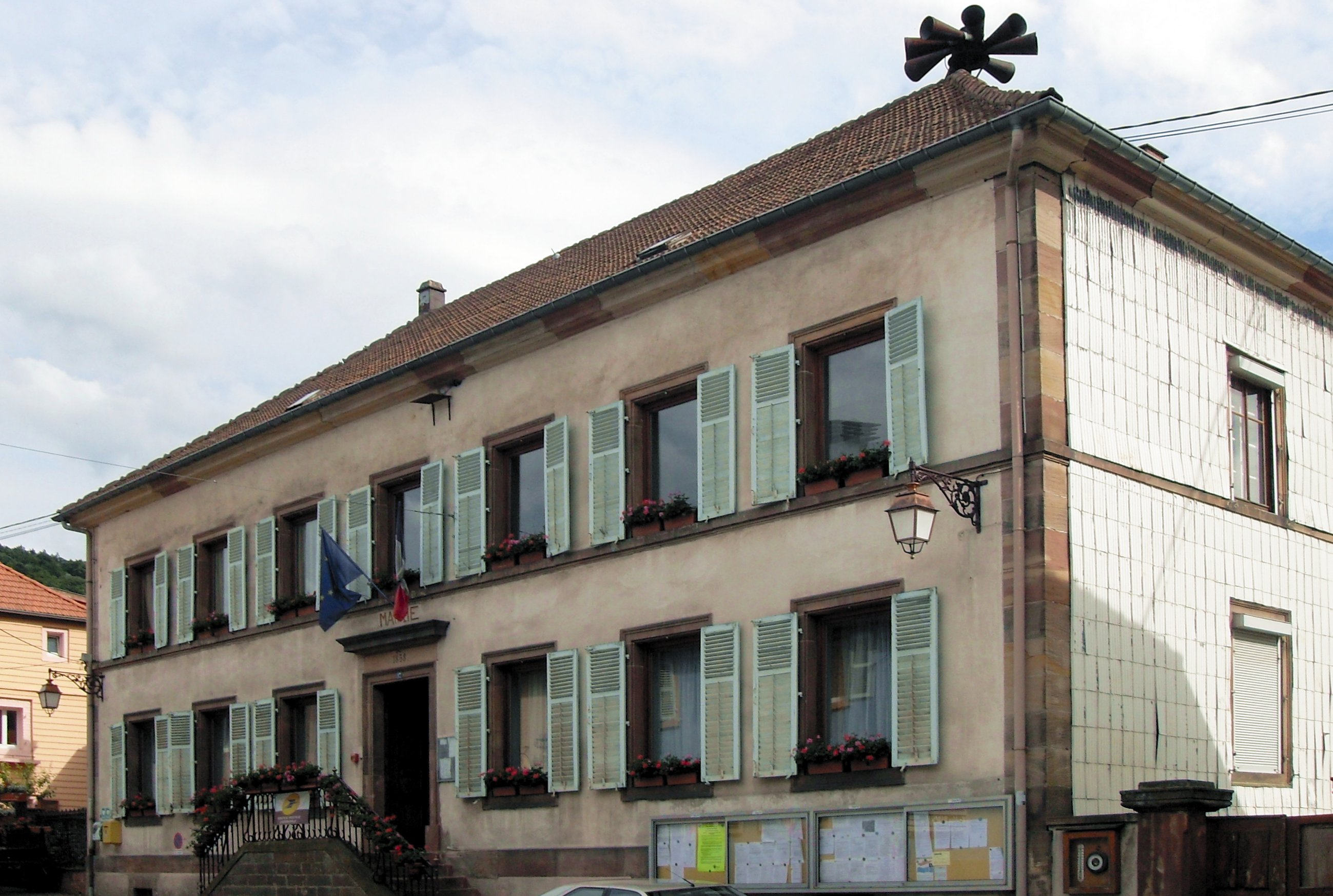 La mairie de Russ